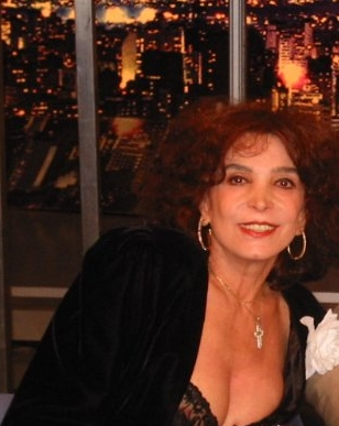 Lady Chuquer Volla Borelli de Bourbon (Belo Horizonte, 7 de janeiro de 1940), mais conhecida como Lady Francisco é uma atriz brasileira. Defensora dos direitos dos animais, lançou em 2004 o livro autobiográfico Nunca fui santa.